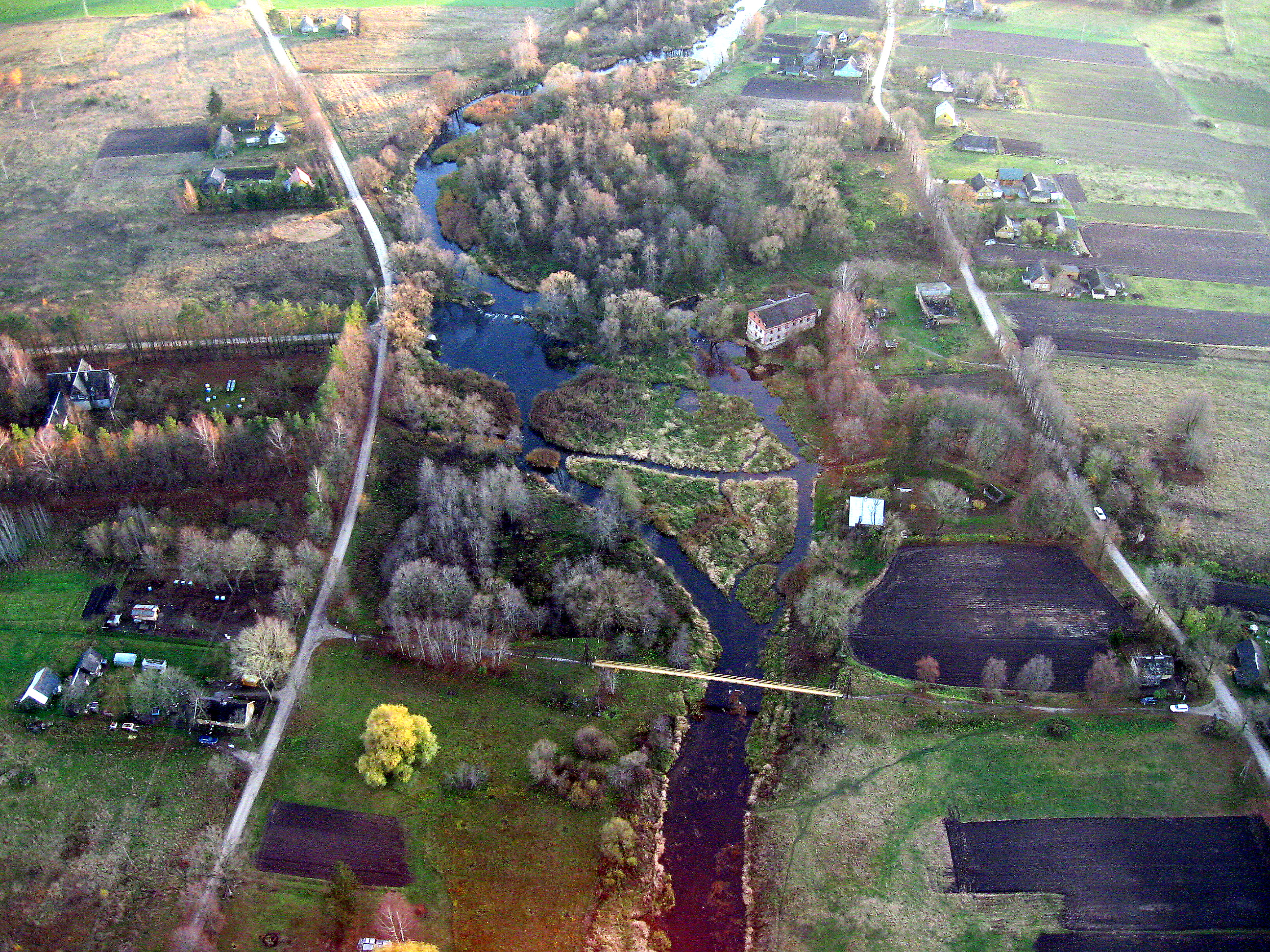 Lėvuo ties Geobrastais. Fotografuota 2008-11-02.